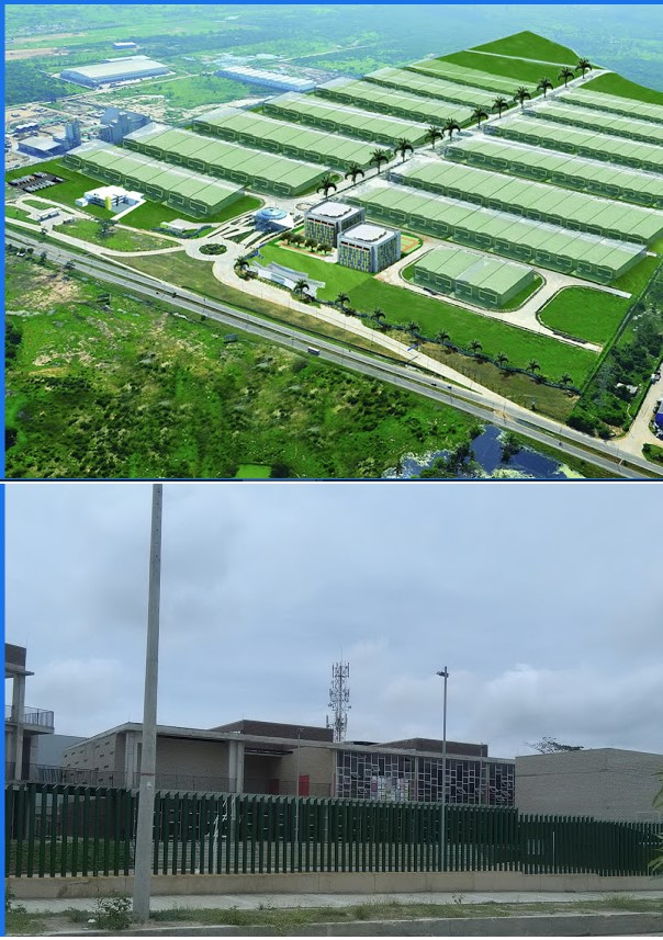 Galapa